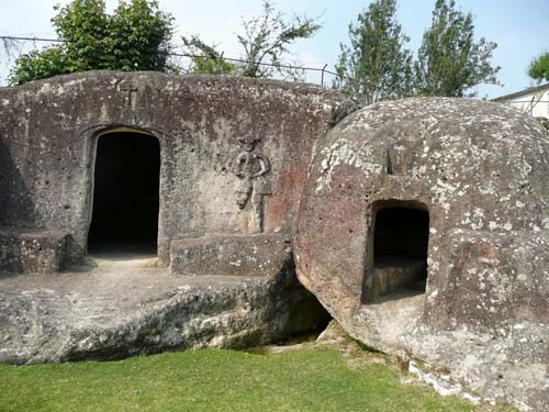 Casa de Piedra, construida en 1538.